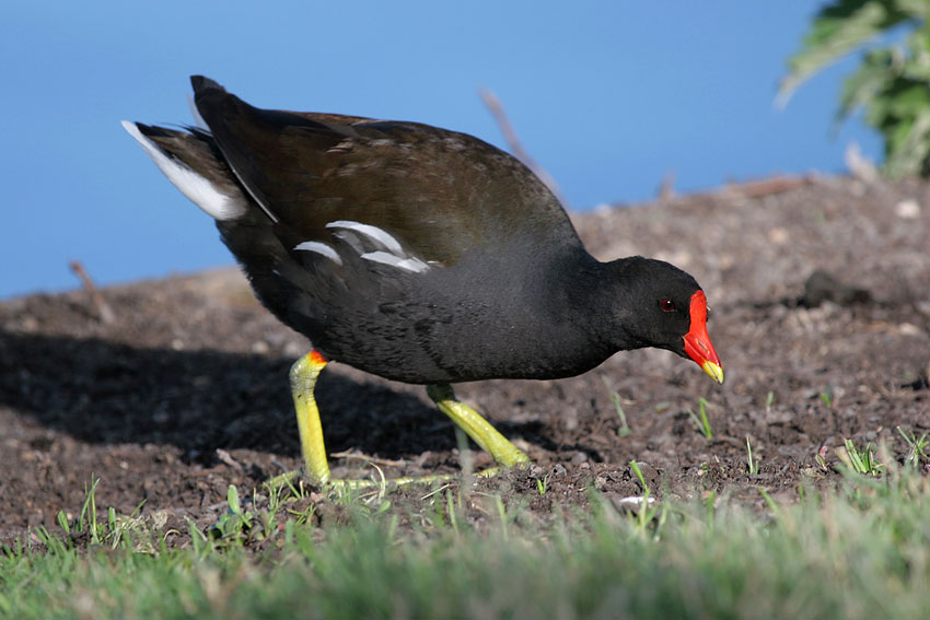 Teichhuhn, Teichralle, Kokoszka, Moorhen, Gallinula chloropus